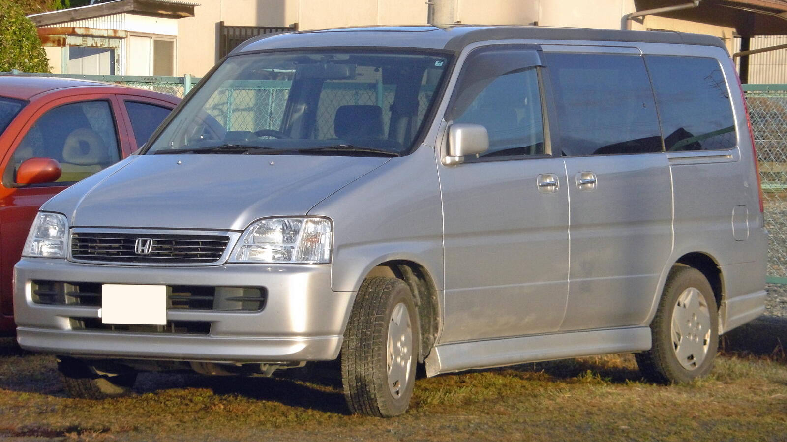 ホンダ・ステップワゴン（初代・後期型）